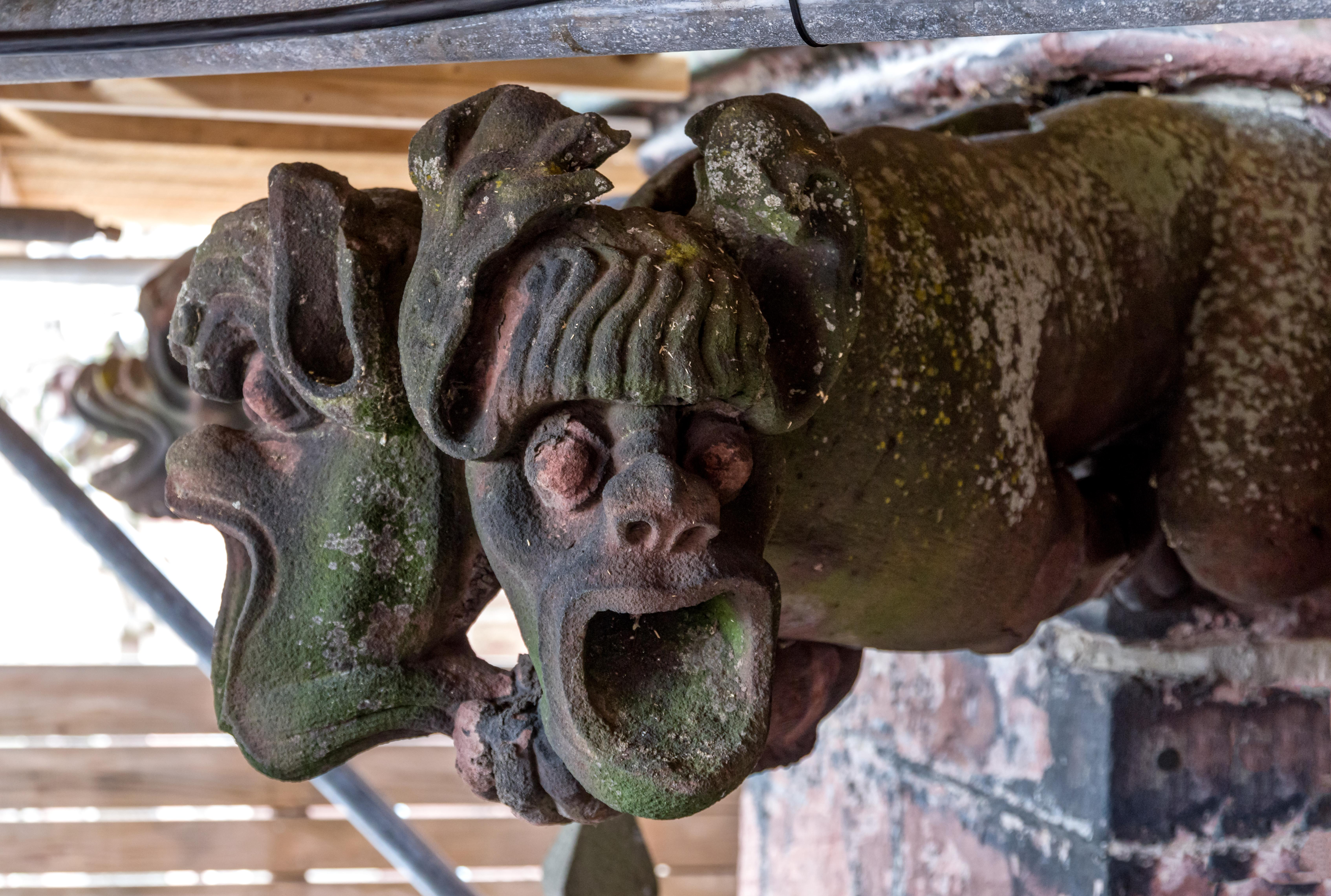 Bilder aus Freiburg Tag der offenen Baustelle 24.06.2017 (am Freiburger Münster